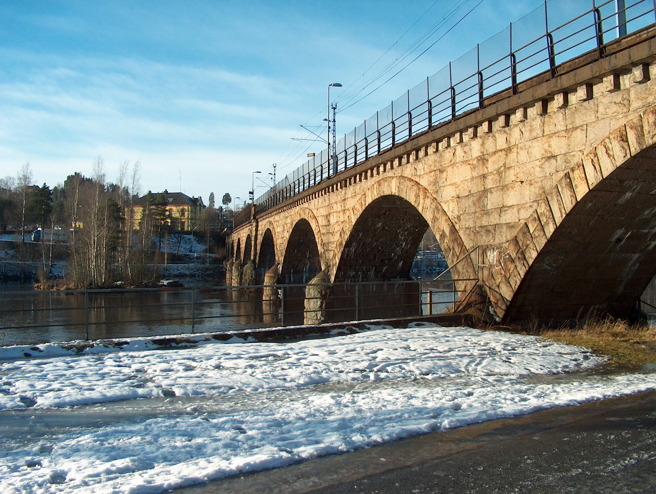 Begna bru (Begna Bridge), jernbanebrua over Ådalselva (a railway bridge past River Begna)